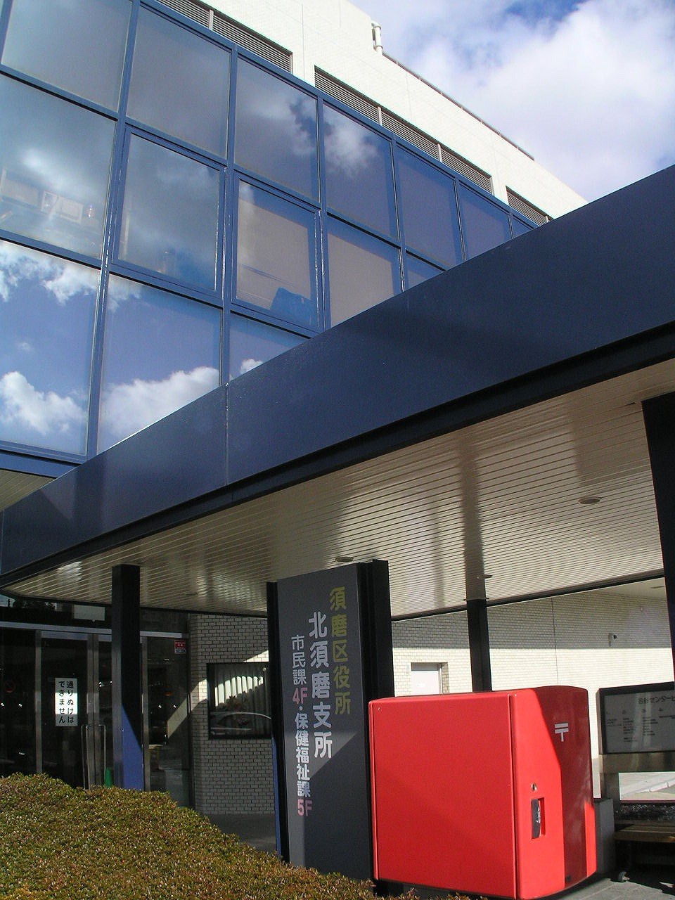 須磨区役所北須磨支所 名谷駅前 神戸市営地下鉄西神・山手線